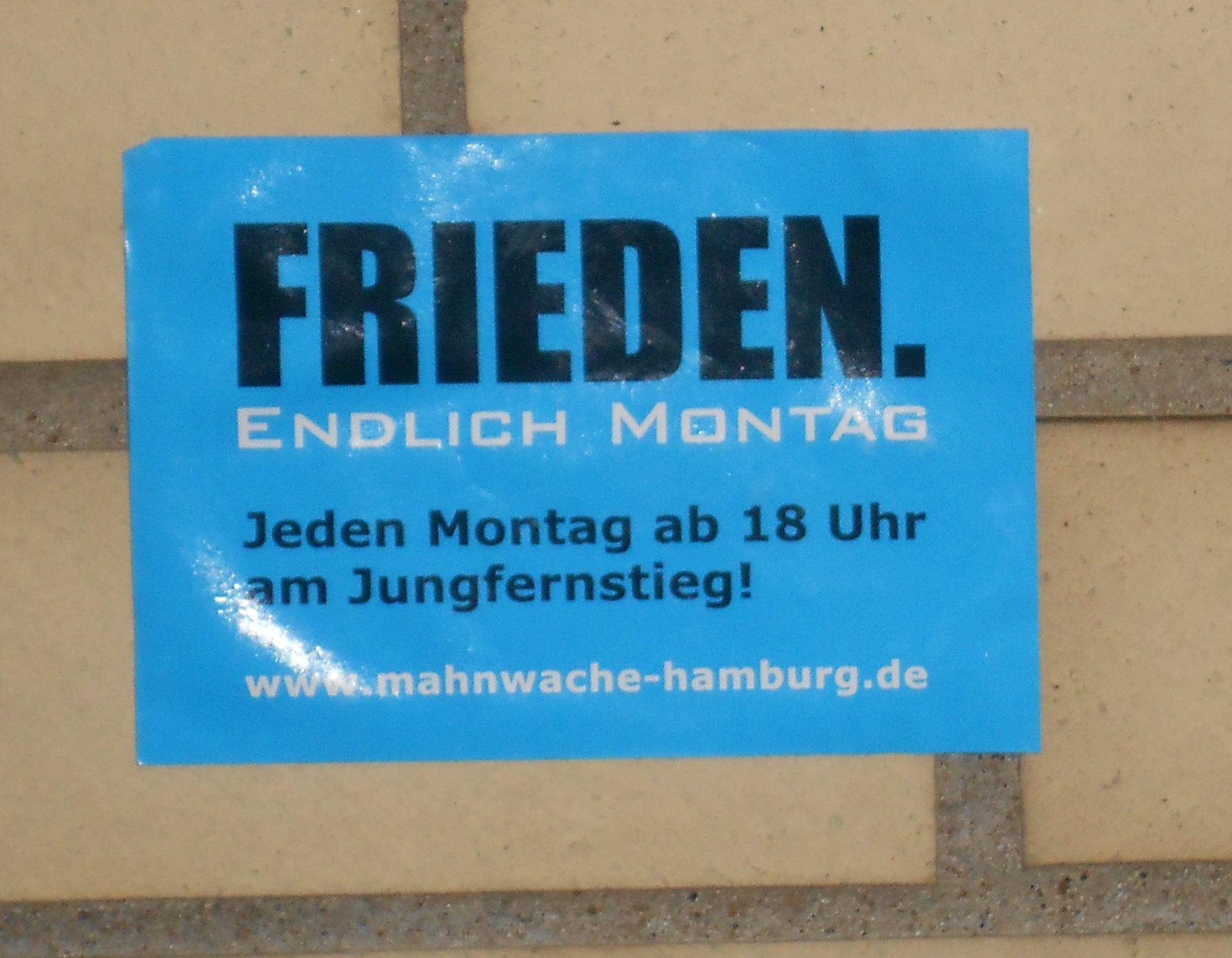 Aufkleber mit Aufruf zu den Mahnwachen FÜR den Frieden / Montagsdemonstrationen in Hamburg (keine Schöpfungshöhe)